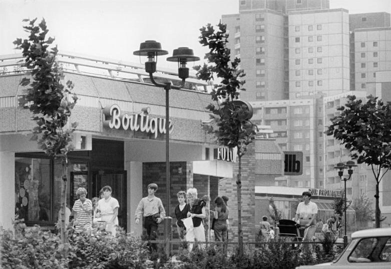 Berlin, Marzahn, Ladenstraße, Promenade ADN-ZB Zimmermann 29.7.88-We-Berlin: Bummel in Marzahn - Die Marzahner Promenade lädt bereits zum bummeln ein, auch wenn nebenbei noch gebaut wird. 1988 sollen weitere Geschäfte wie Wohnraumtextilien, Foto-Optik, Apotheke, Sportartikel, Rundfunk- und Fernsehtechnik hinzukommen. (siehe auch ADN-Fotos Nr. 20,21, und 22)